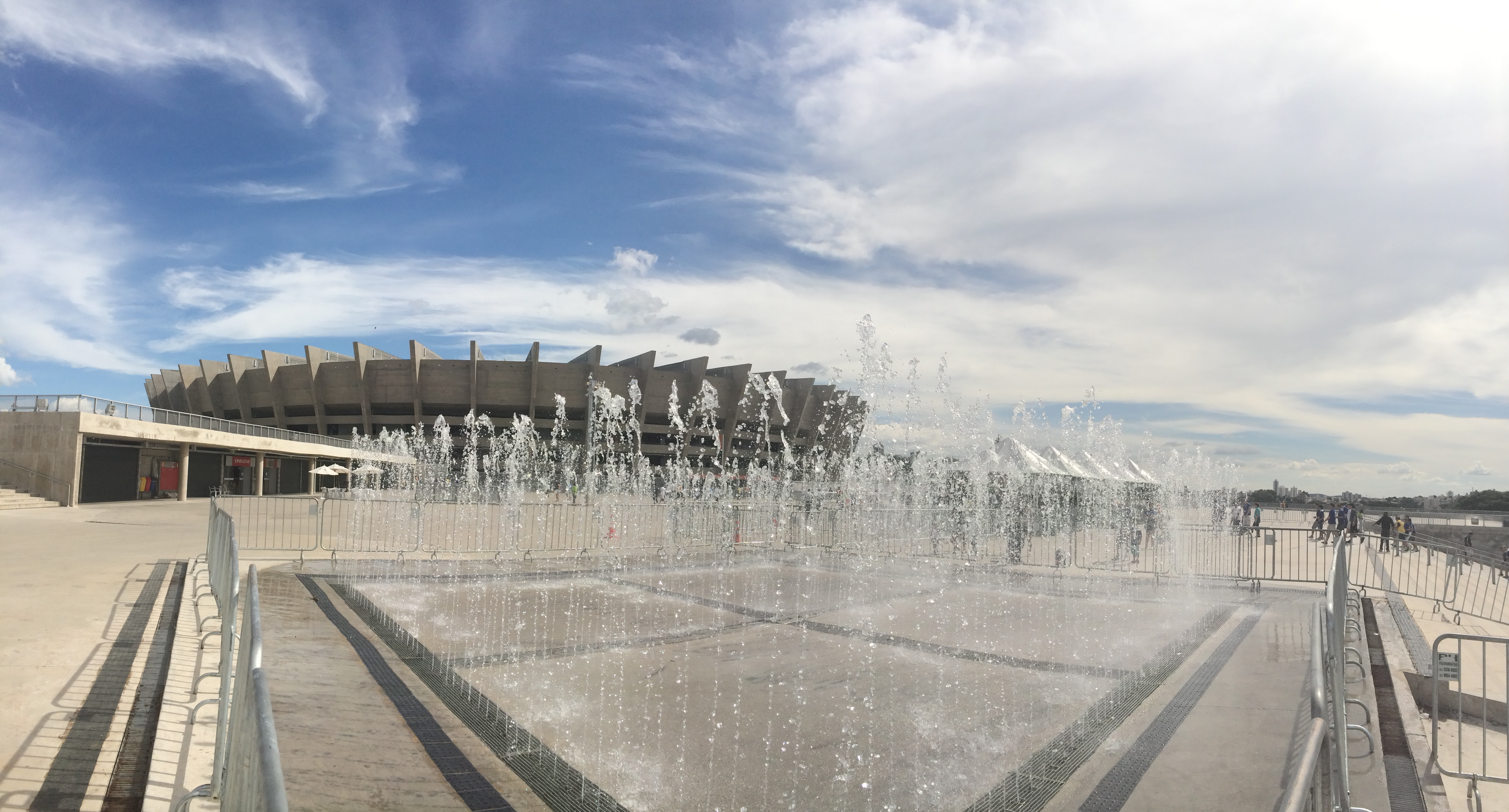 Mineirão - Belo Horizonte